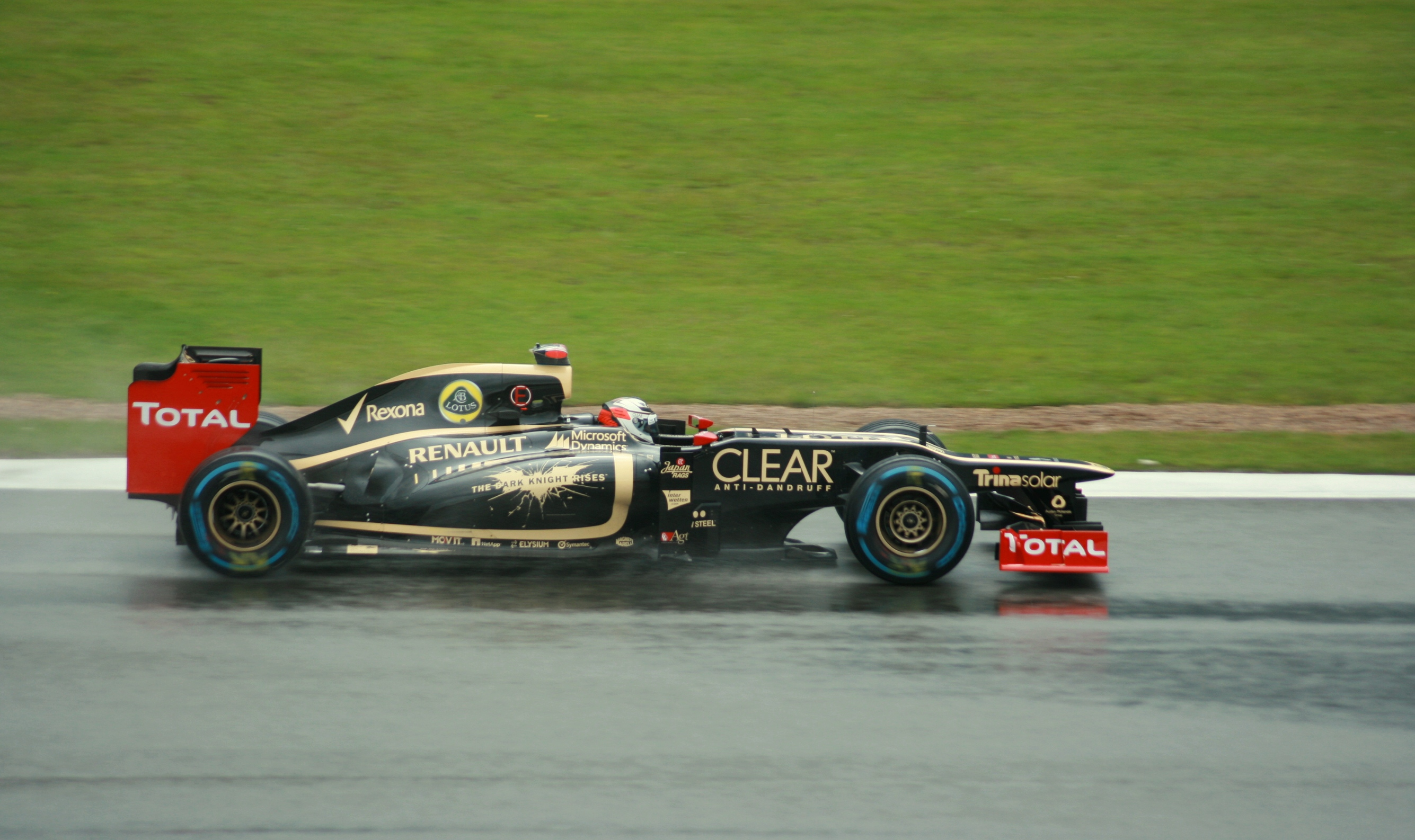 Kimi Raikkonen, Lotus E20